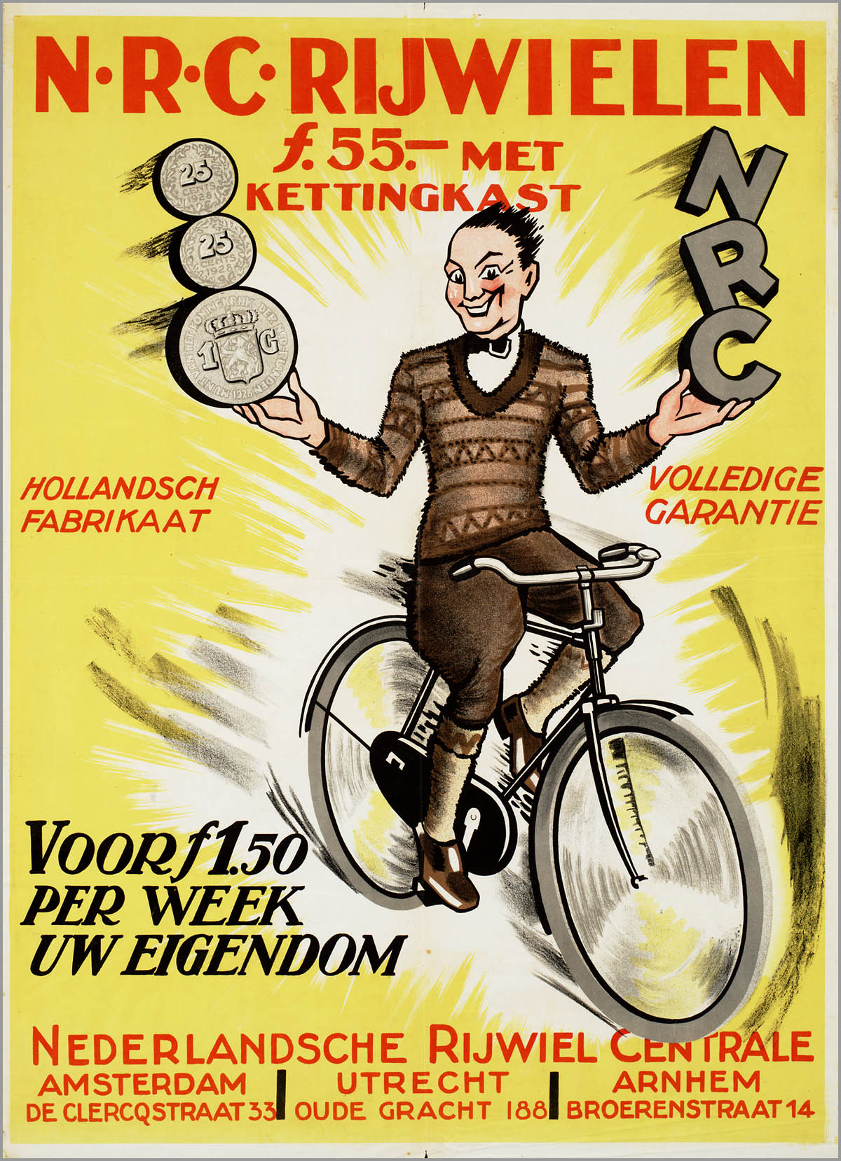 Affiche: N.R.C. Rijwielen.